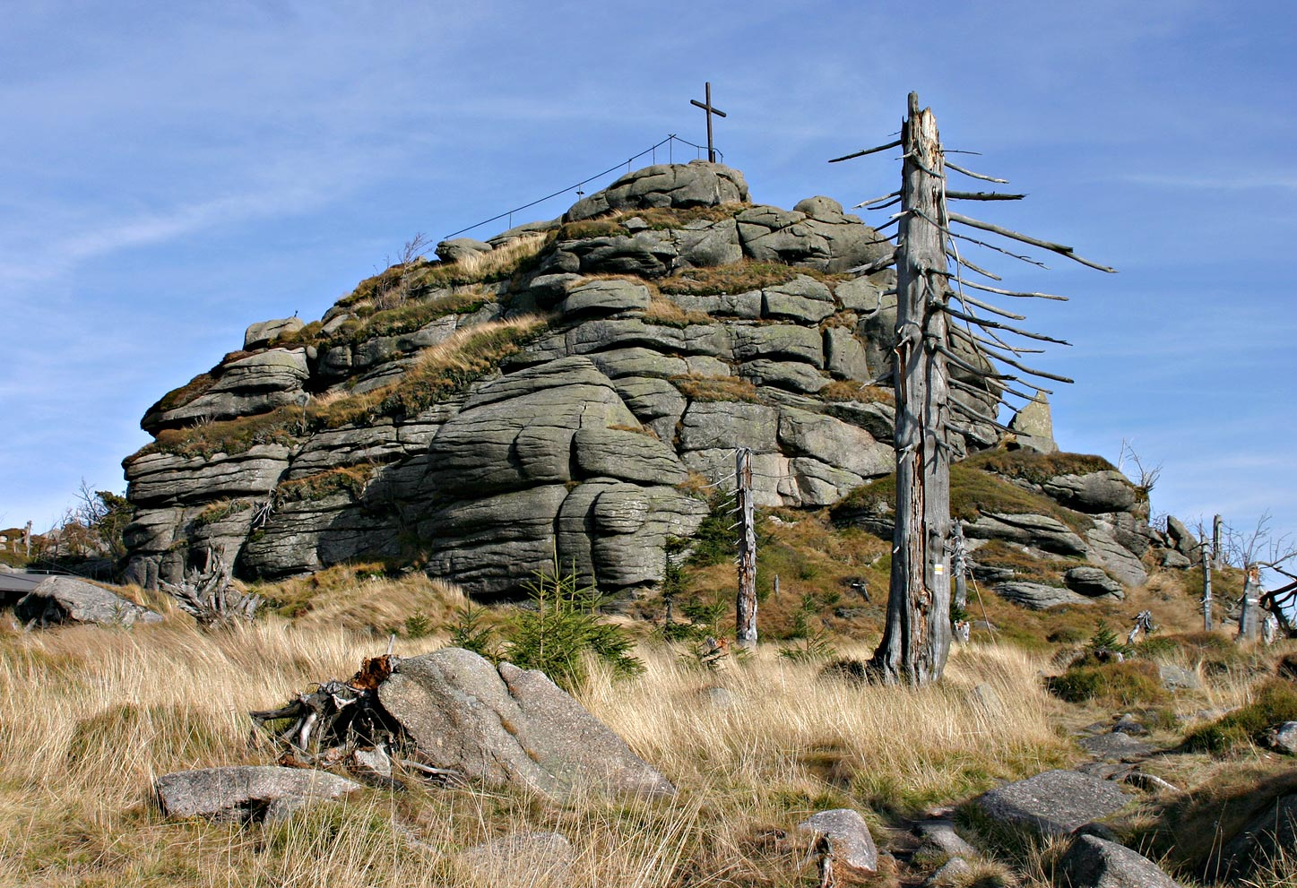 Vrchol Jizery. (vlastní fotografie)